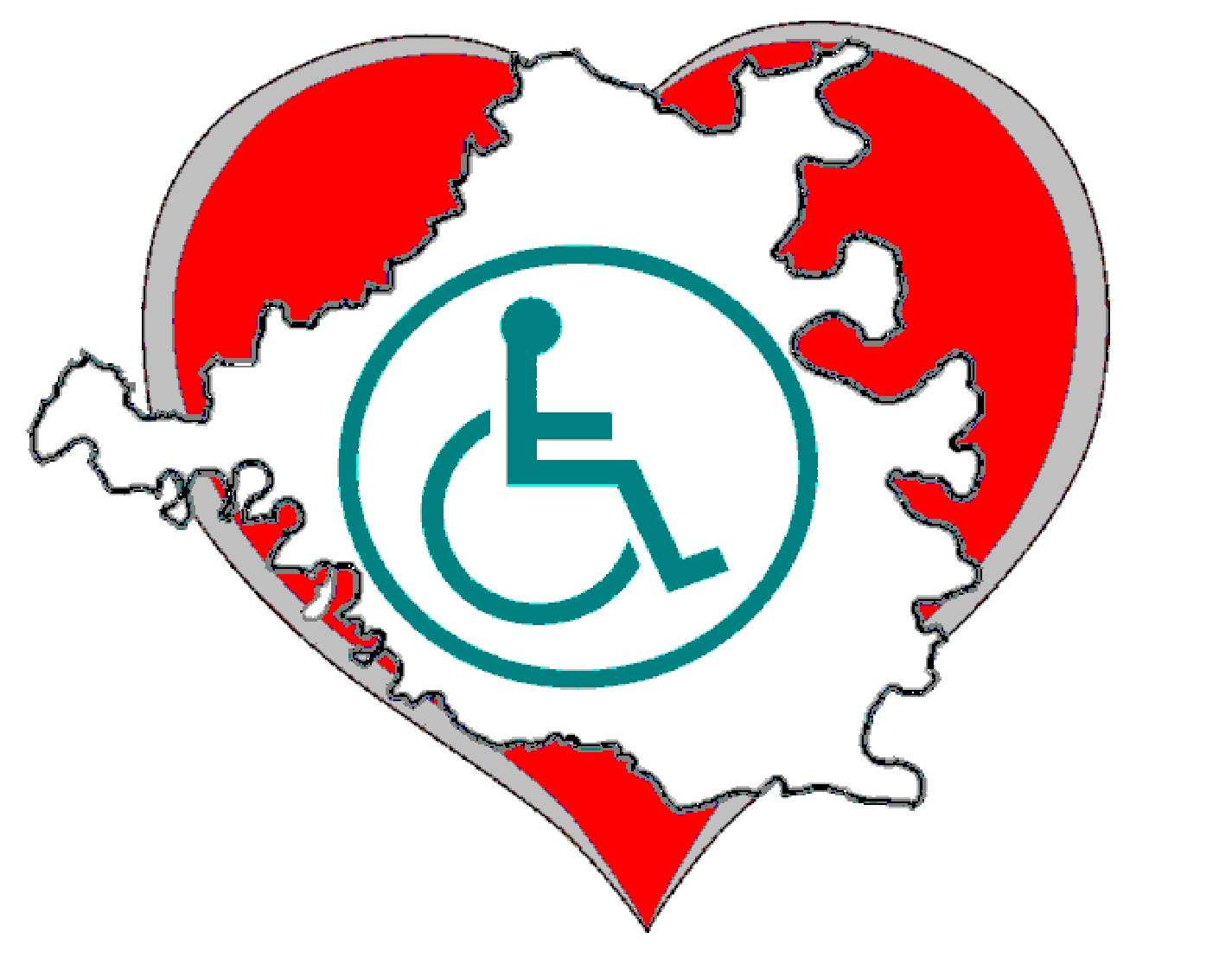 logo: Baranjsko srce iz Belog Manastira